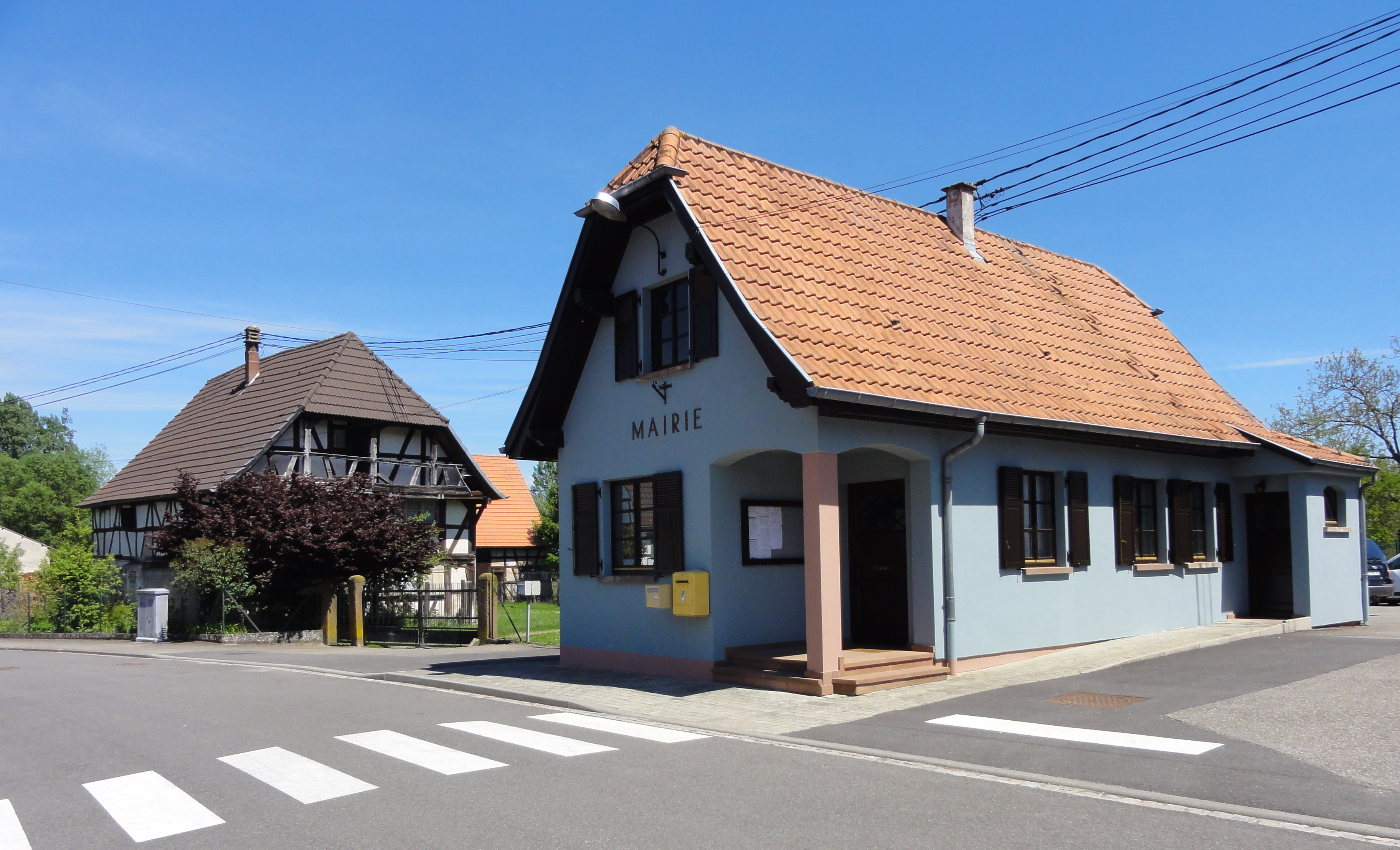 Alsace, Bas-Rhin, Uttenhoffen, Mairie (XX?)